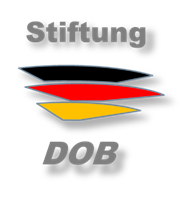 Neues Logo der Stiftung Deutscher Offizier Bund Stand 2016